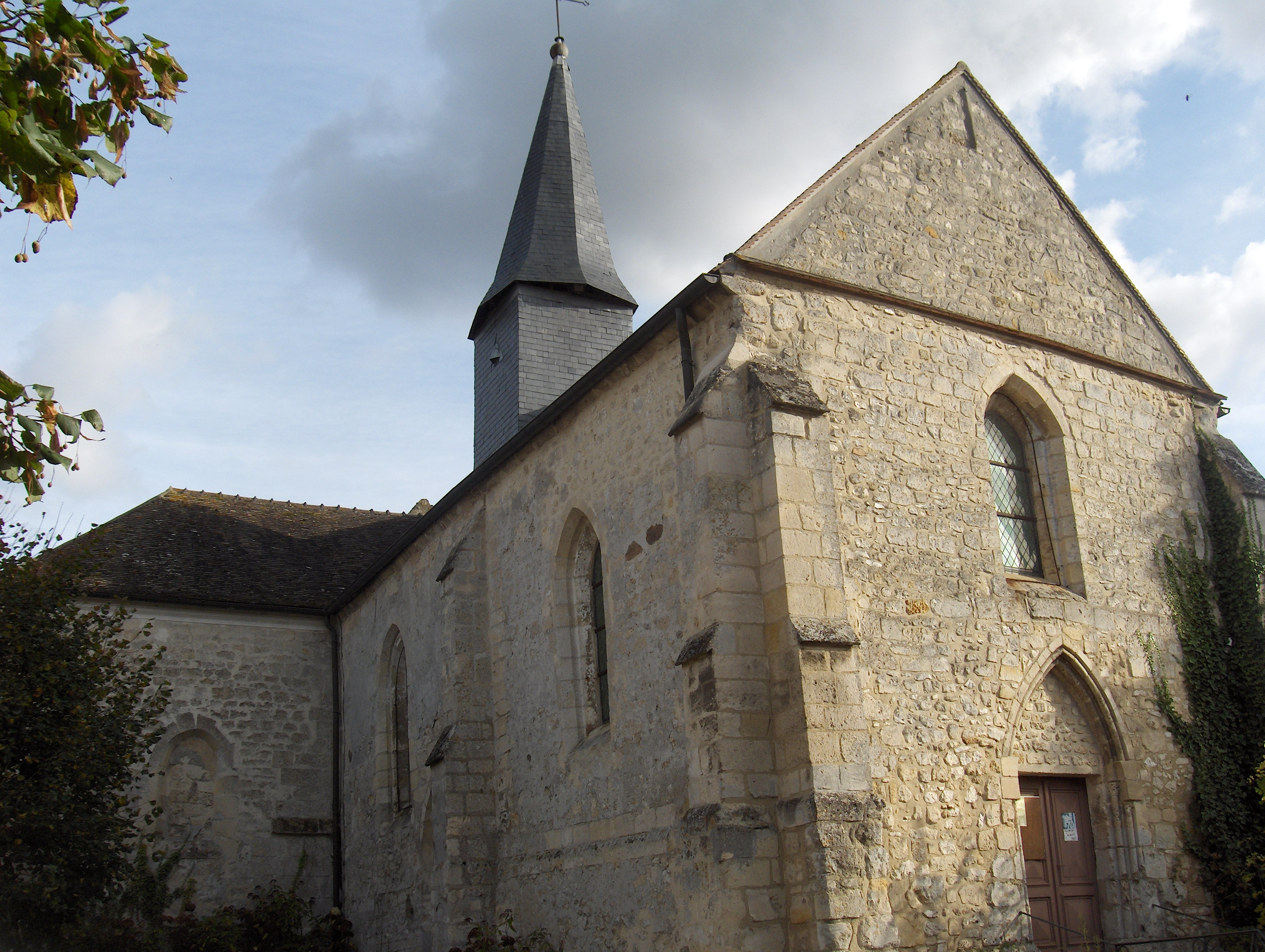 Eglise de la Sainte Trinité à Hédouville